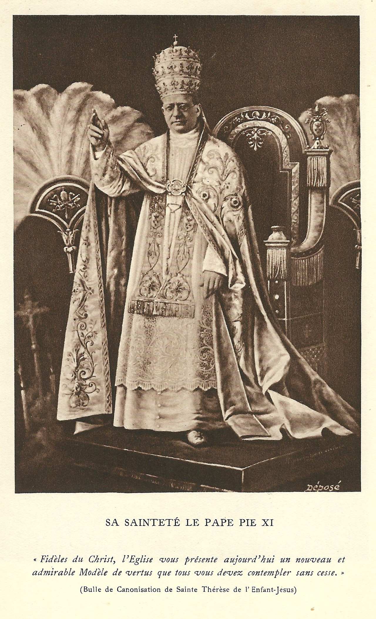 Gravure de "Sainte Thérèse de l'Enfant Jésus, Histoire d'une âme écrite par elle-même, Lisieux, Office central de Lisieux (Calvados), & Bar-le-Duc, Imprimerie Saint-Paul, 1937, édition 1940."